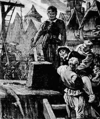 L'exécution du marquis de Pontcallec (dessin page de garde de "Les drames de l'histoire.... Le marquis de Pontcallec" par Raoul de Navery, publié en 1899)